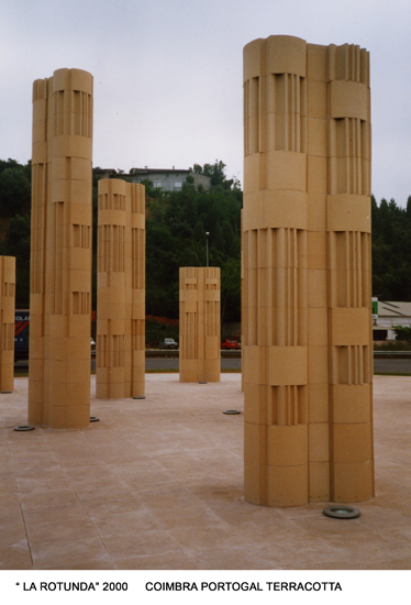 La Piazza delle 20 colonne